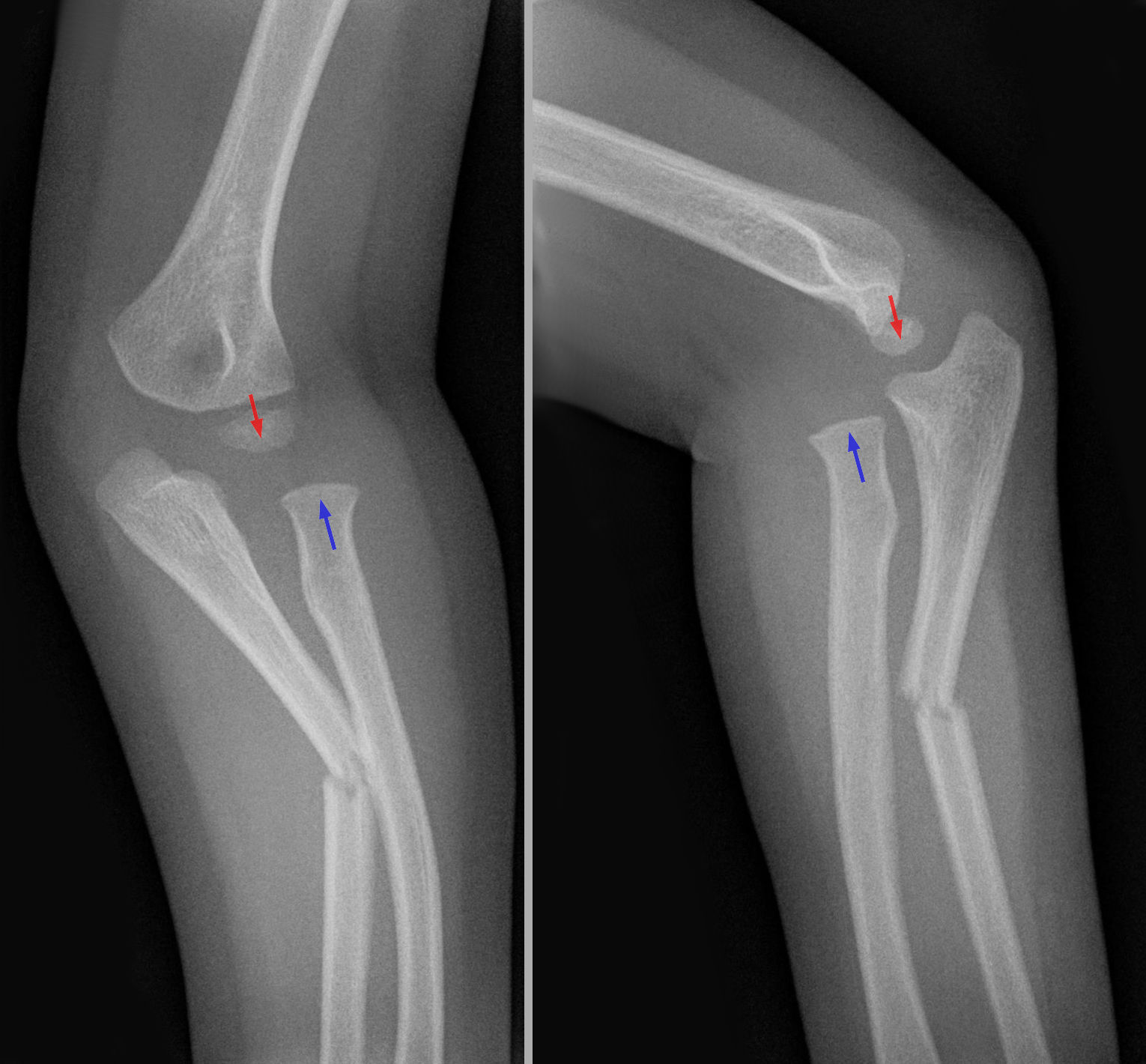 Monteggia-Fraktur bei einem Kind. Neben dem unschwer erkennbaren Bruch der Ulna besteht eine Luxation des Radius nach lateral volar. Das noch nicht verknöcherte Radiusköpfchen (blauer Pfeil) sollte dem Knochenkern des Capitulum humeri (roter Pfeil) genau gegenüber stehen.